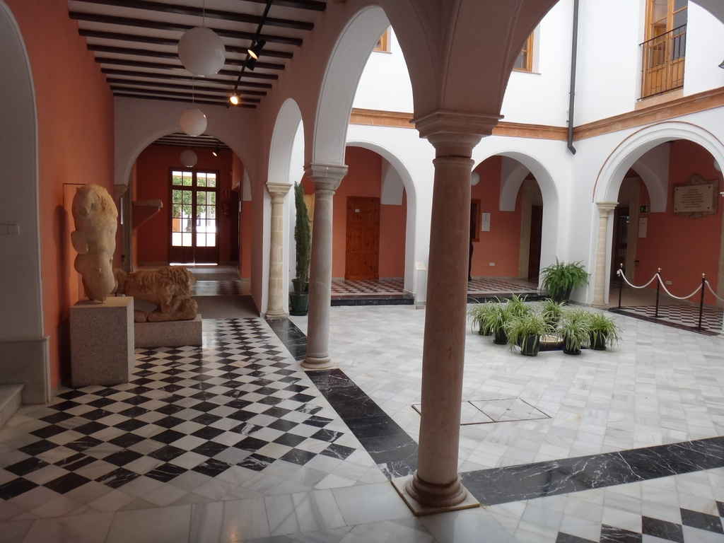 Colección Arqueológica Municipal de Jerez de la Frontera